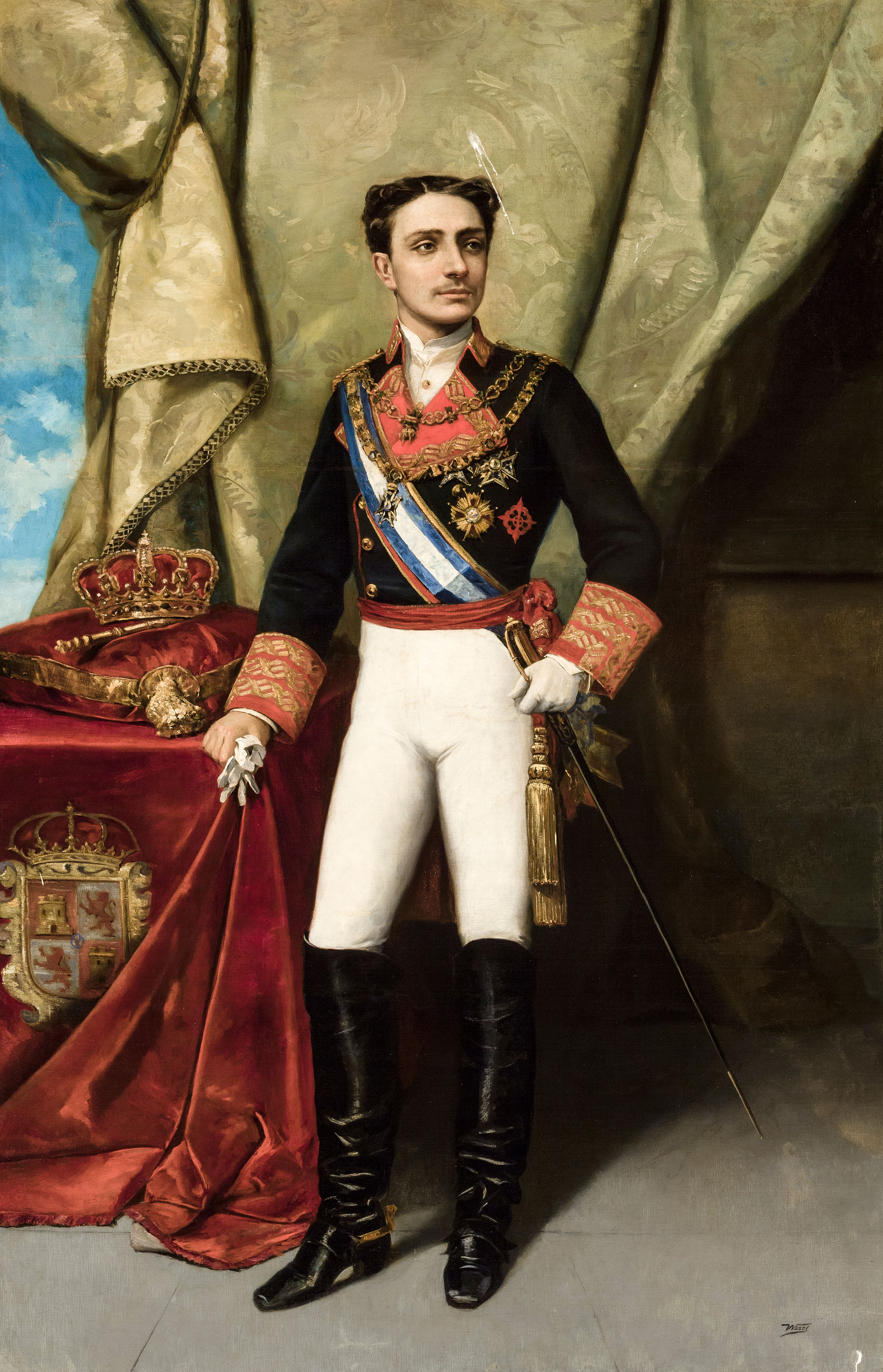 Retrato del rey Alfonso XII de España (1857-1885), que fue hijo de la reina Isabel II de España y del rey Francisco de Asís de Borbón.